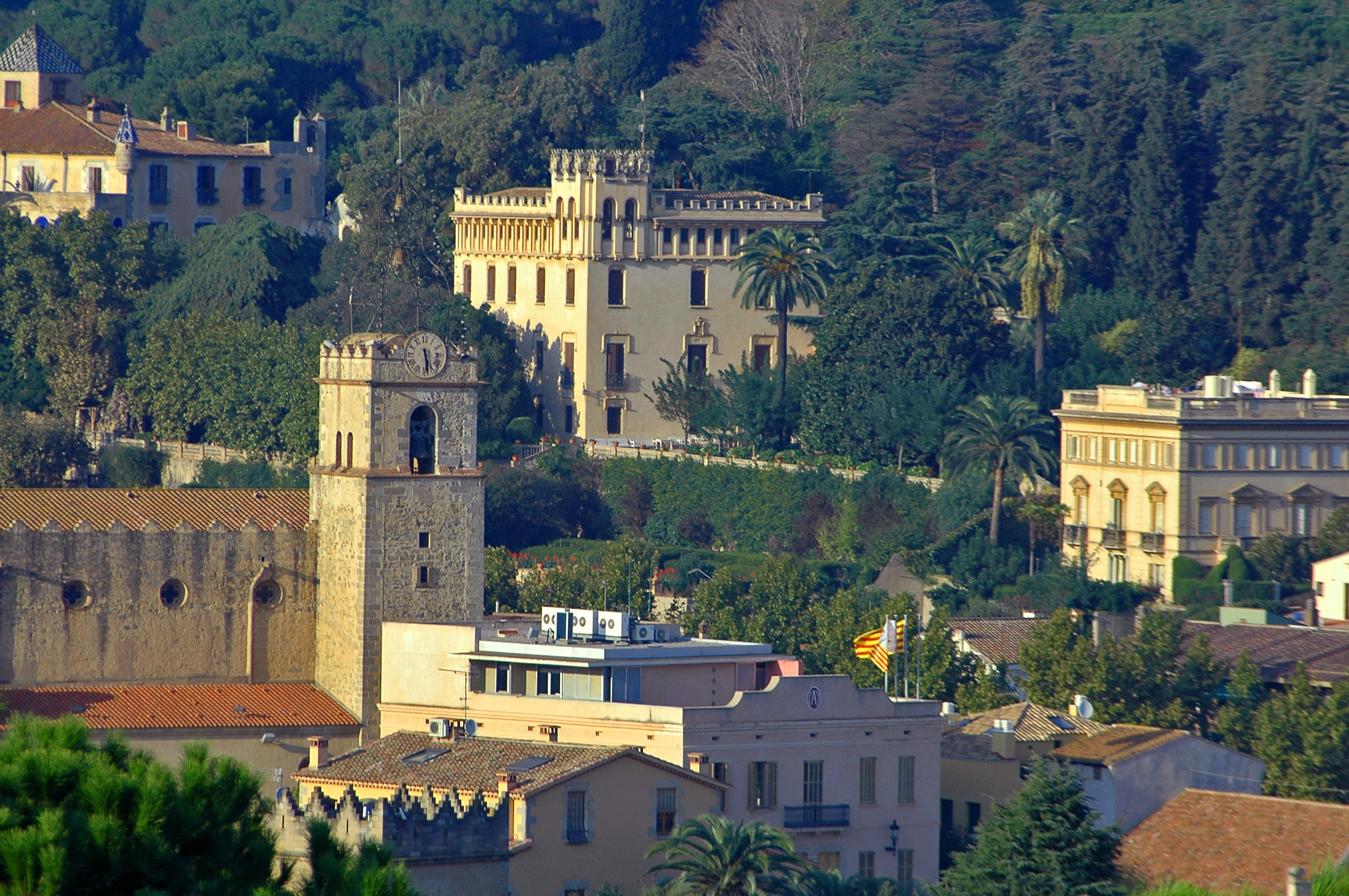 Imatge del centre històric de Teià. Es pot apreciar l'ajuntament, l'església de Sant Martí i Can Godó